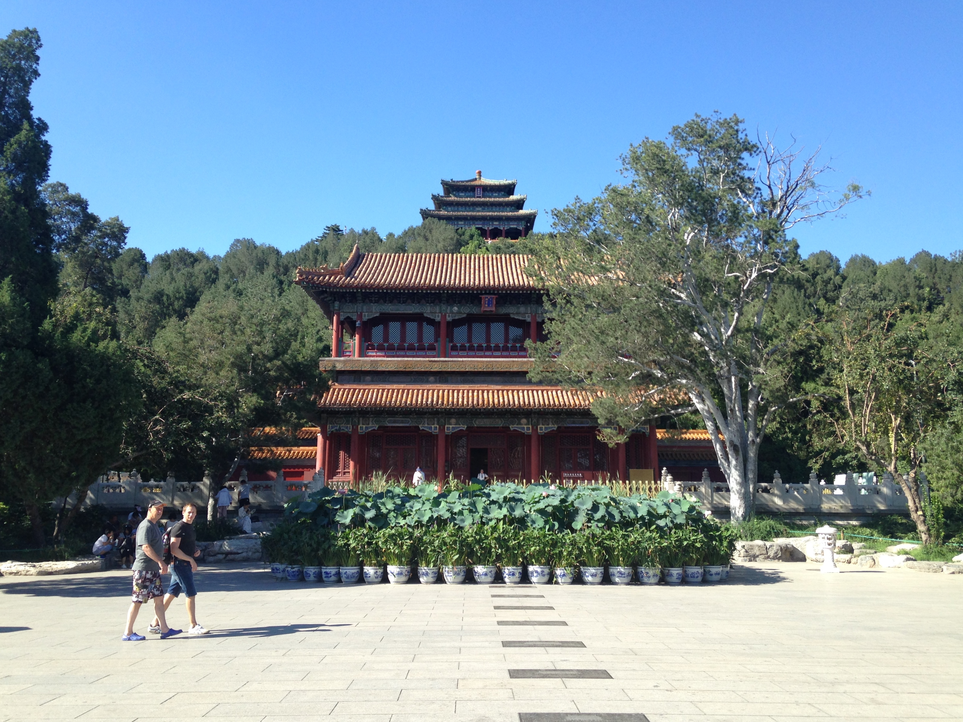 景山公園・綺望楼と万春亭